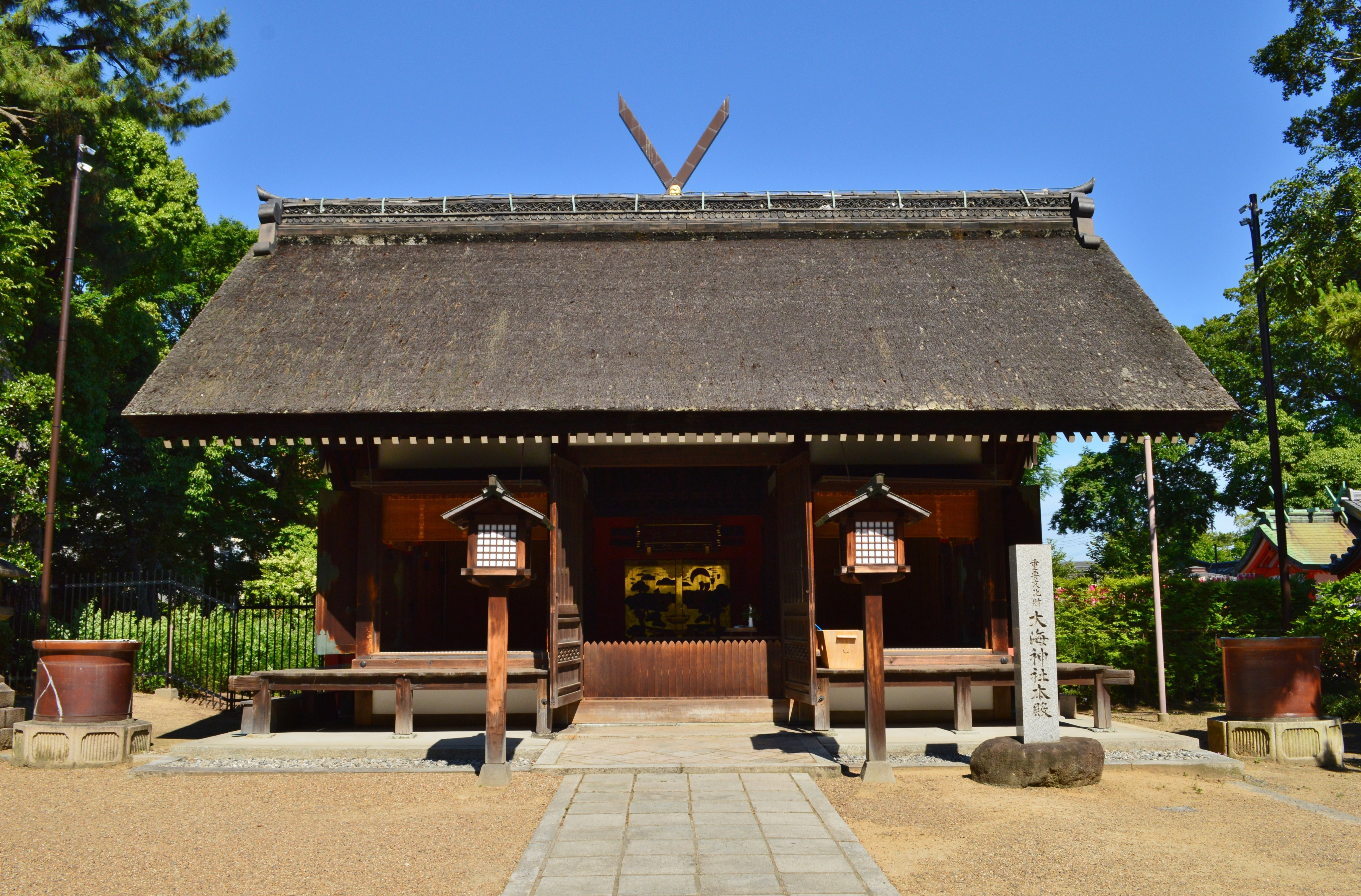 大海神社 (大阪市) 幣殿